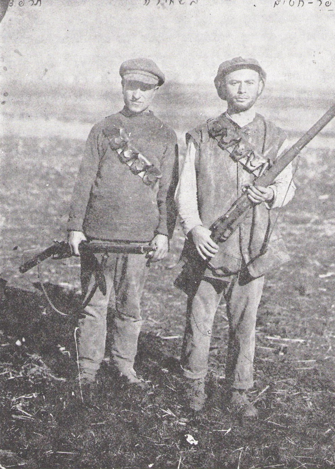 שמירה בכפר חיטים, תרפ"ד